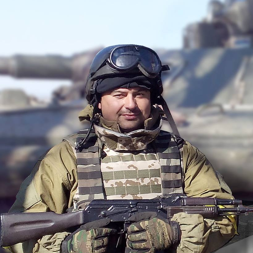 Тарас Пастух у зоні проведення АТО під час проходження військової служби у 128-й гірсько-піхотнiй бригадi ЗСУ.